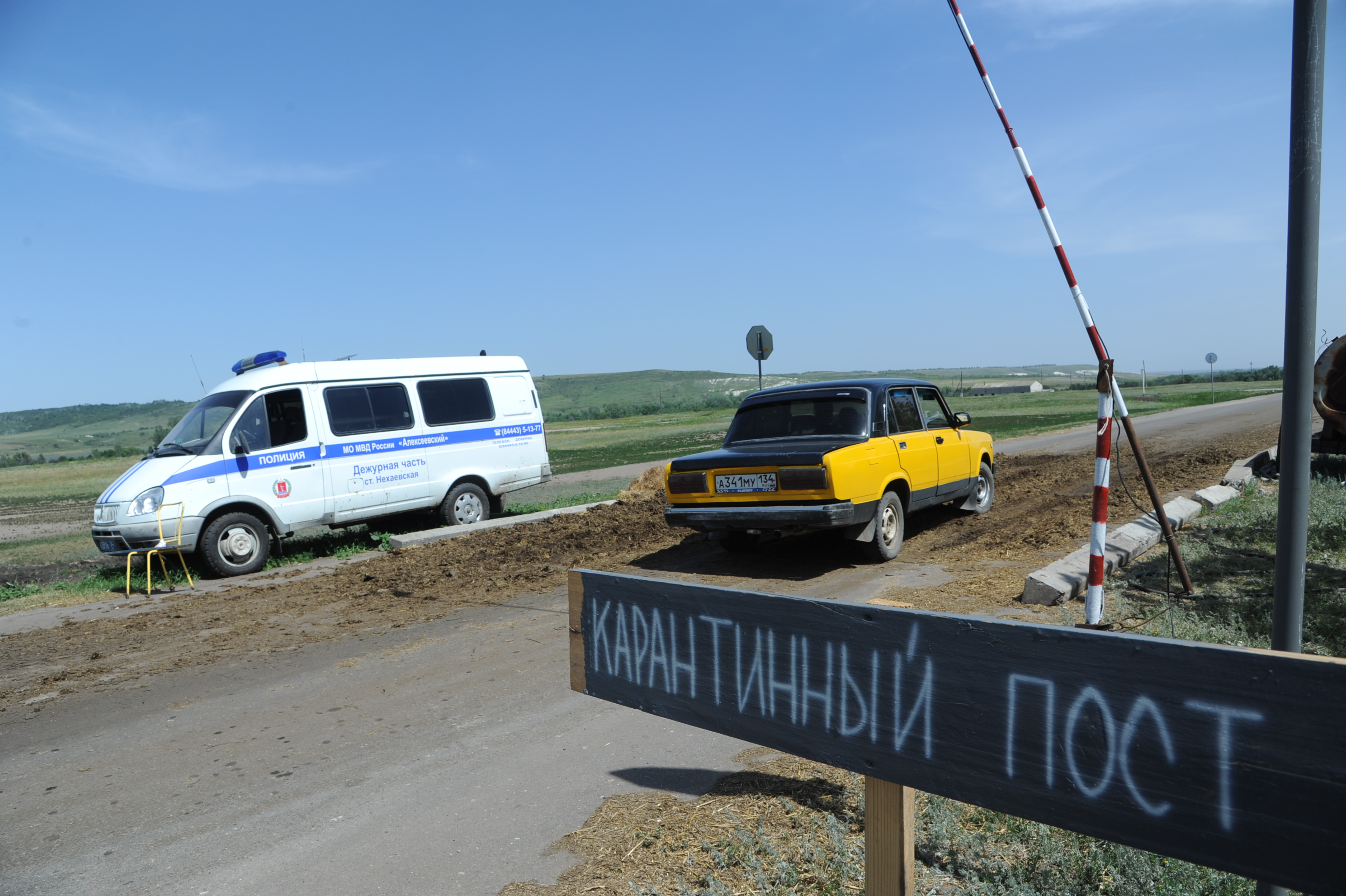 Карантинный пункт